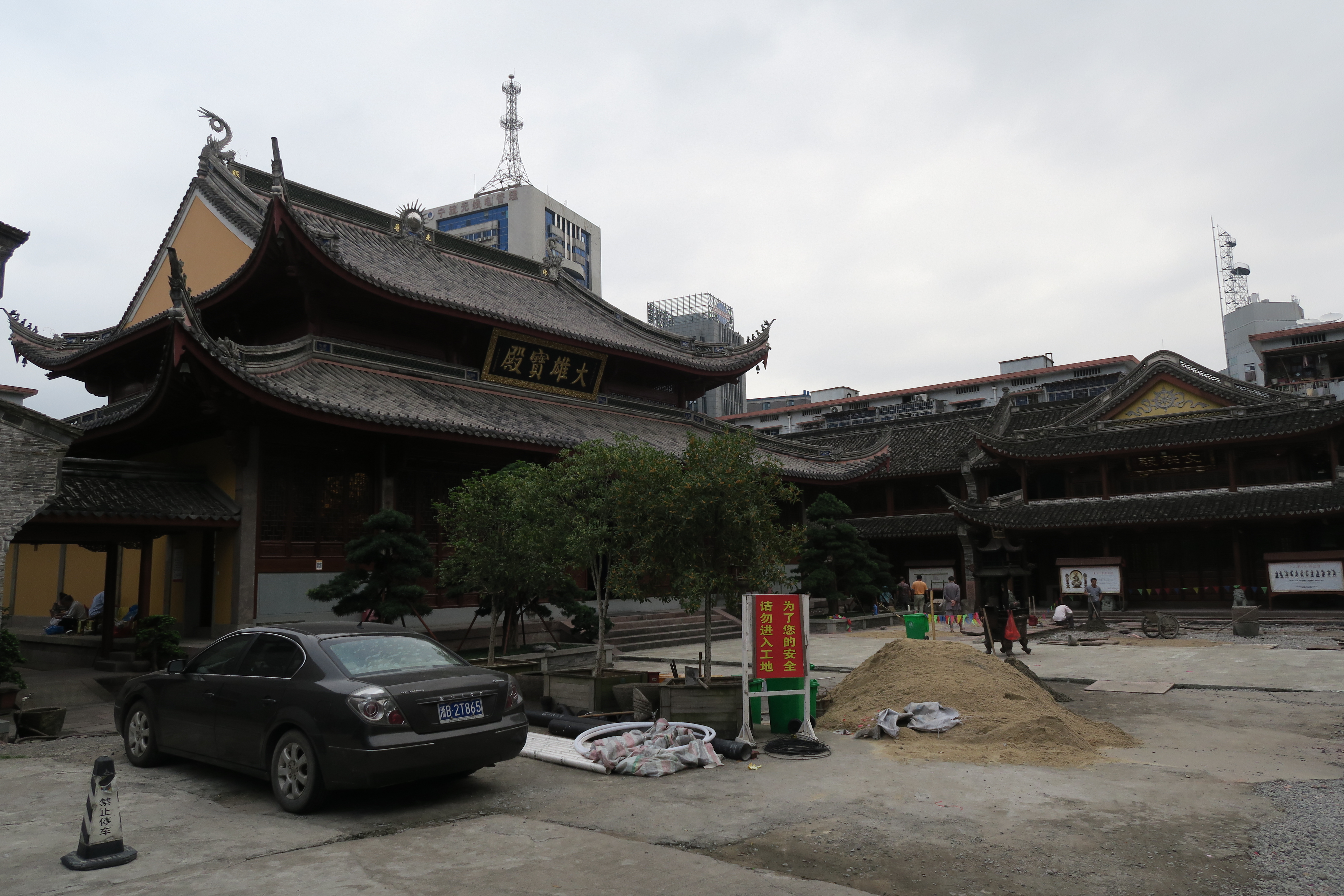 宁波观宗寺